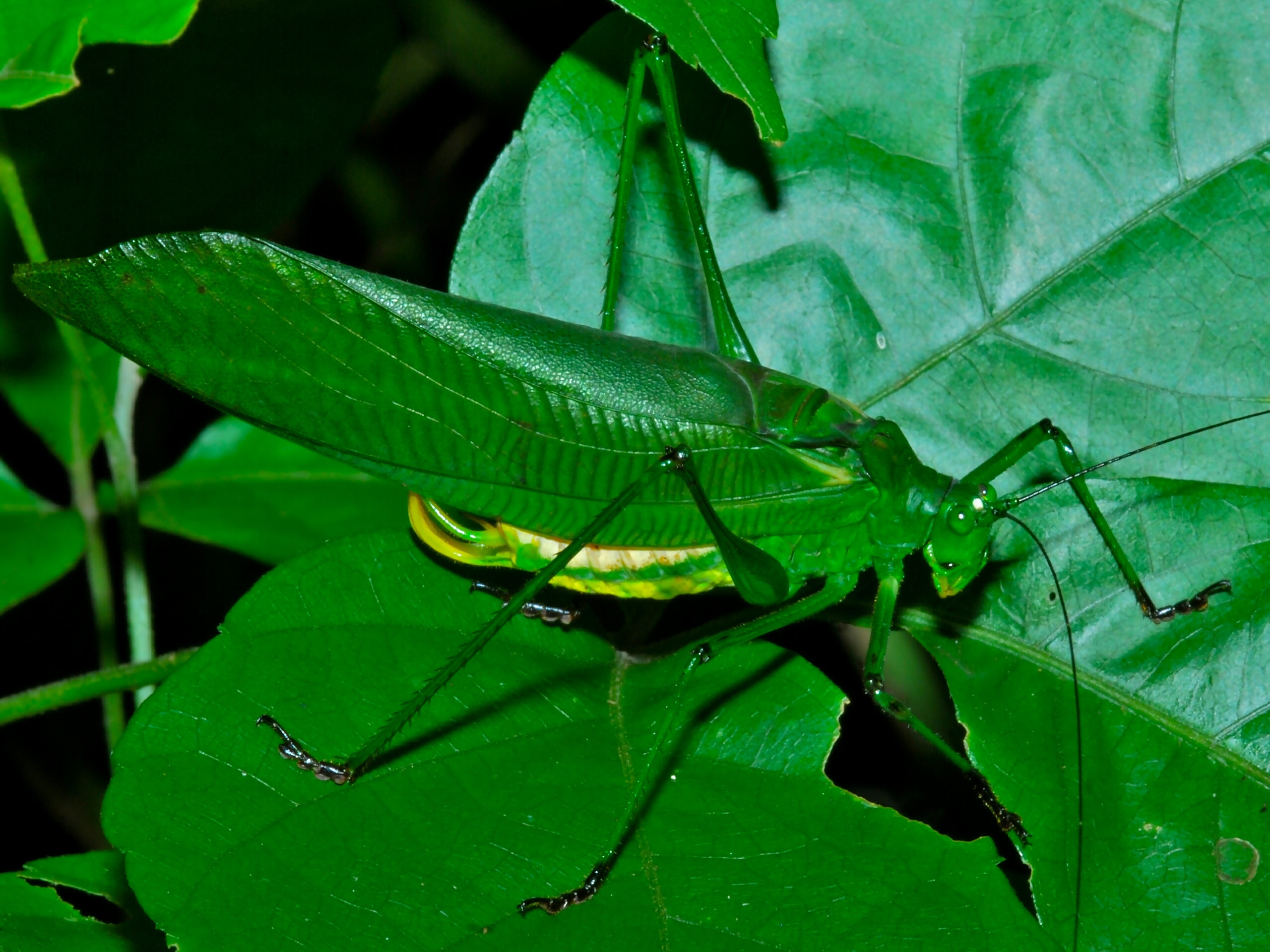 Kibale Forest NP, UGANDA